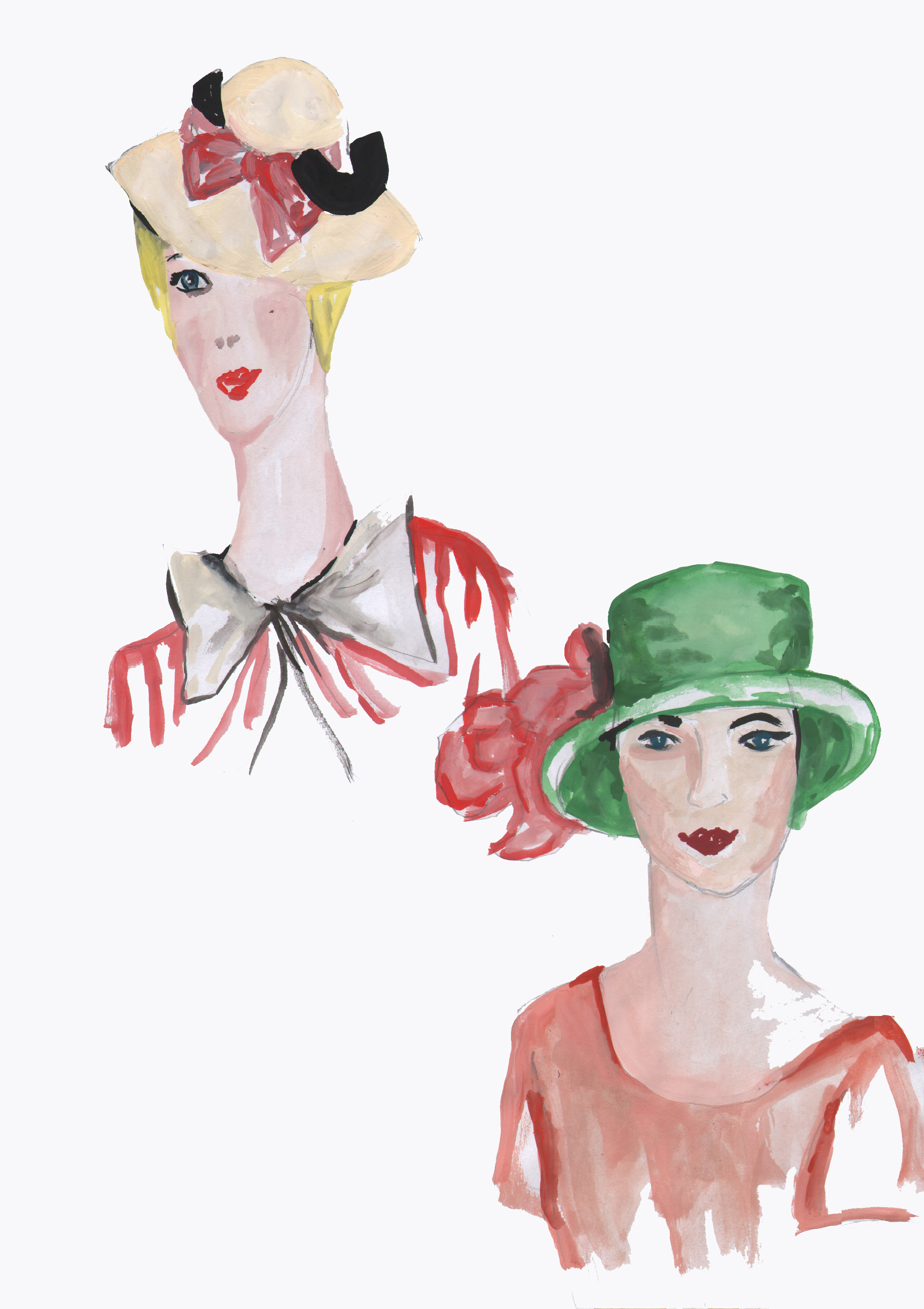 Šeširi 20-ih (gornja) i 30-ih (donja) godina XX veka